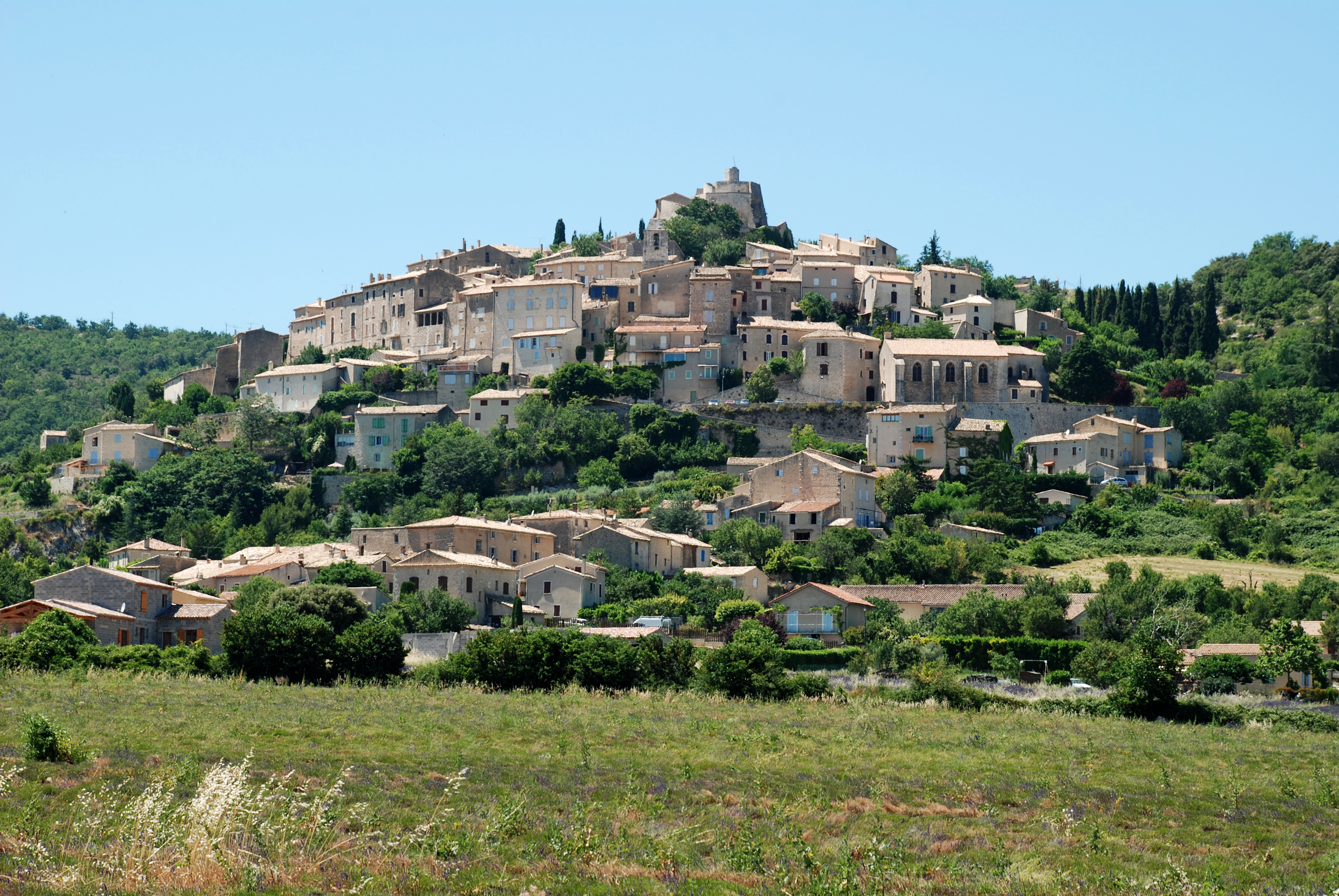 France - Provence - Simiane-la-Rotonde